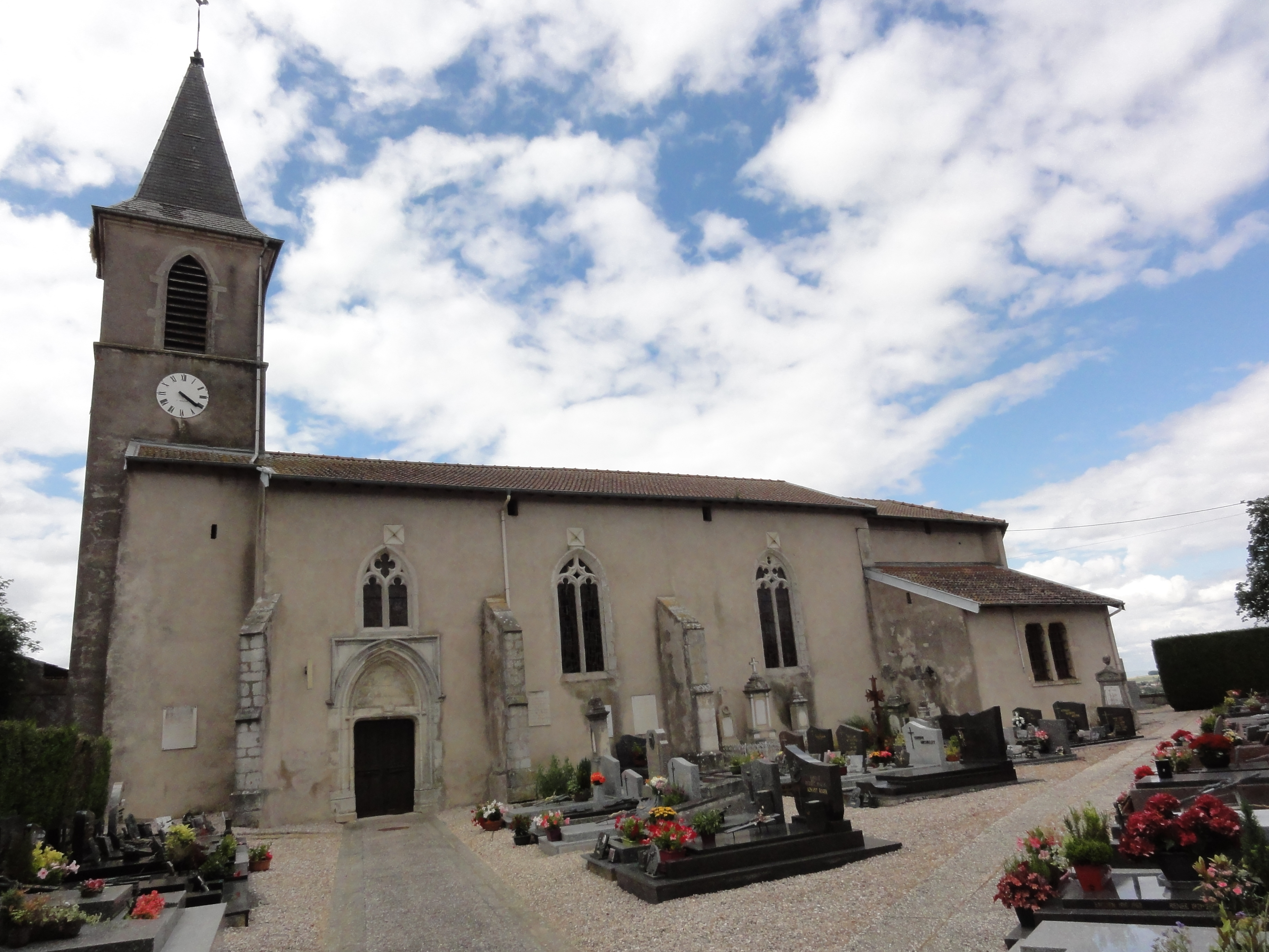 Manoncourt-en-Vermois (M-et-M) église